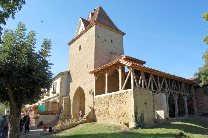 Elle date de la fin du XVème siècle et a été établie sur une ancienne motte castrale. Elle était encore entourée au XIXe siècle par un fossé en eau.